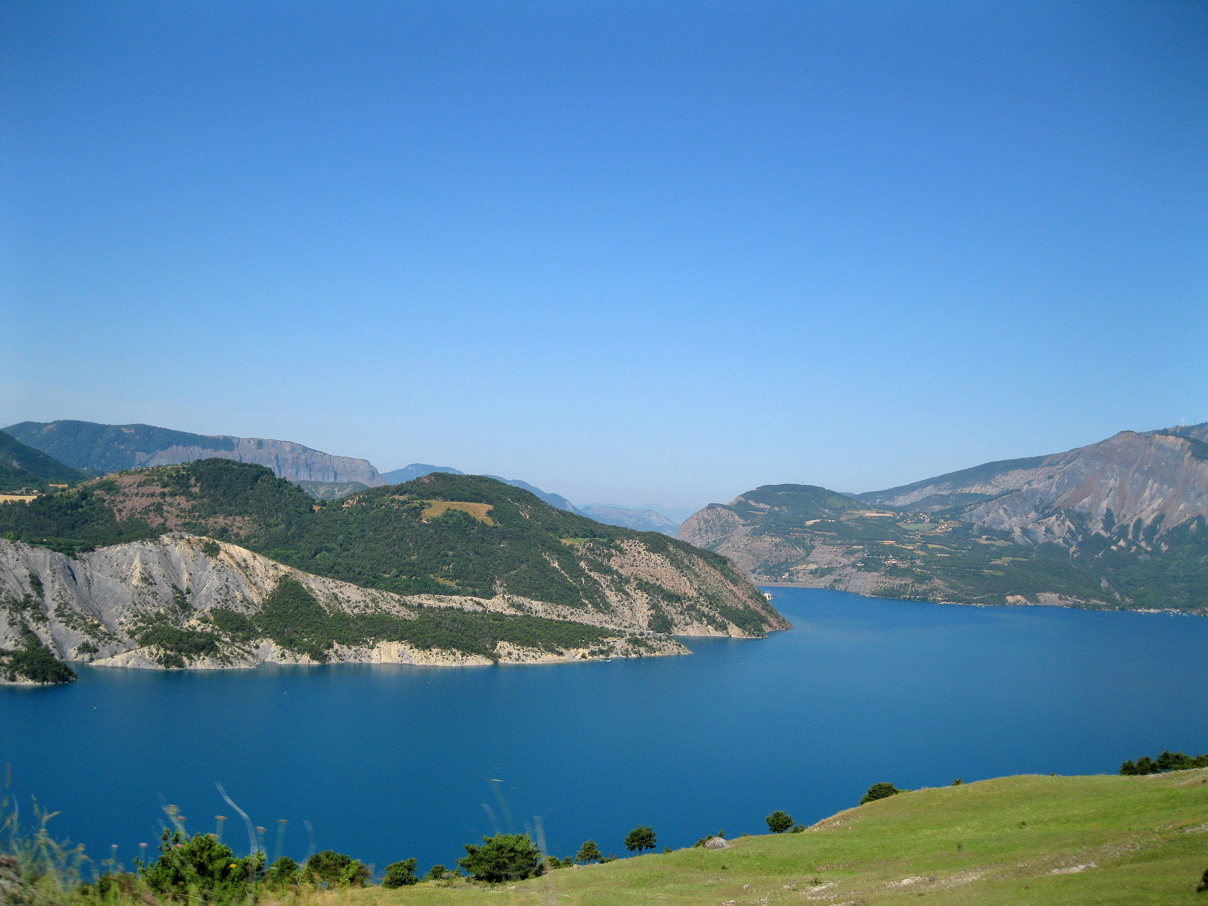 Lac de Serre-ponçon